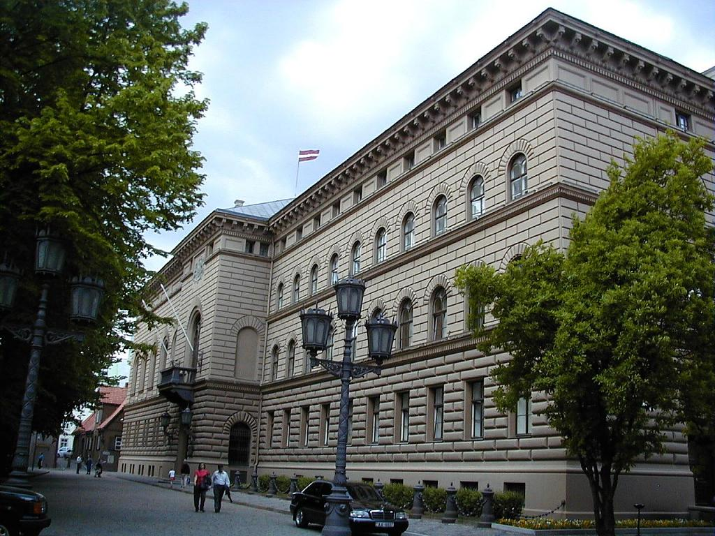 Rīga, Saeima 2002-05-13